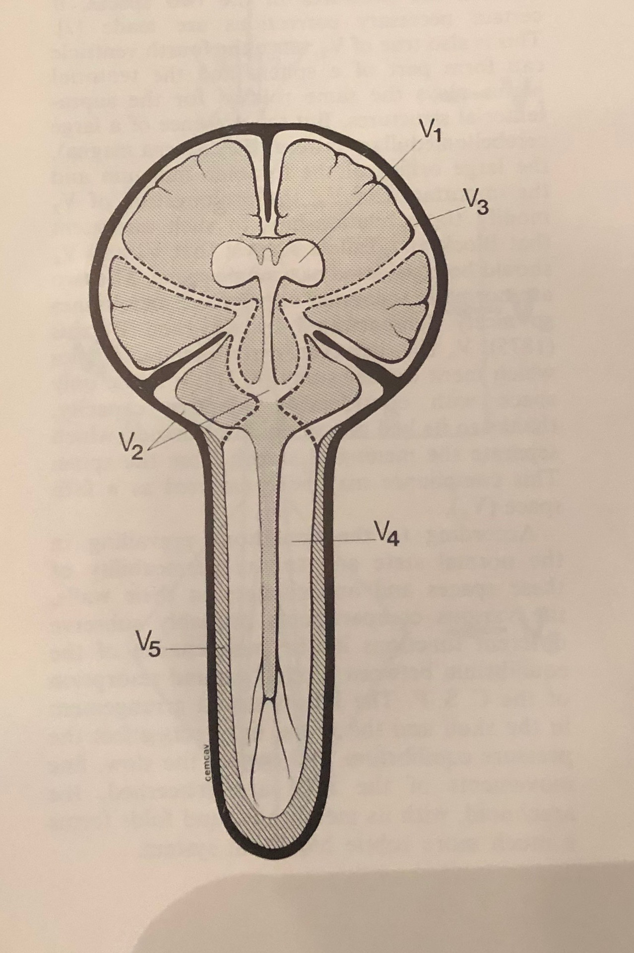 Journal Neuroradiology 1978